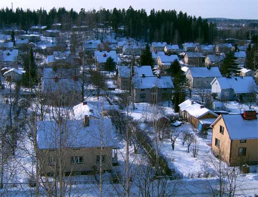 Näkymä Kerinkalliolta vuonna 2005.